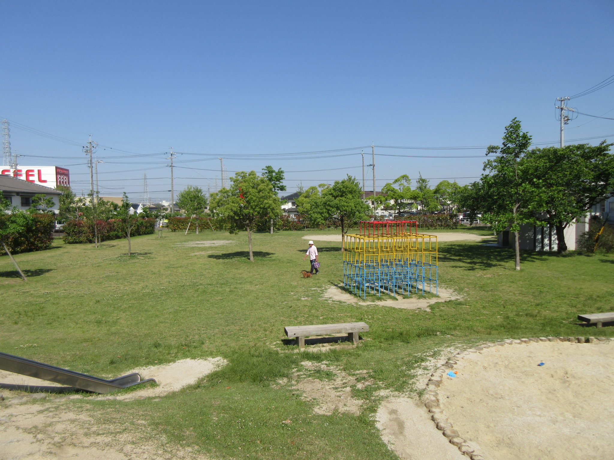 馬畷公園（岡崎市柱3丁目）